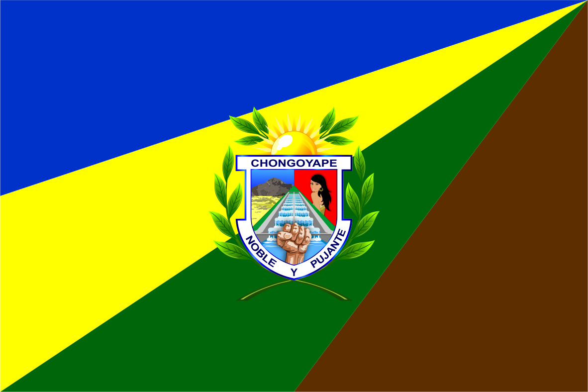 Distrito de Chongoyape - Provincia de Chiclayo - Región Lambayeque